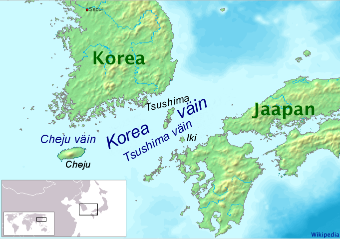 Korea väin